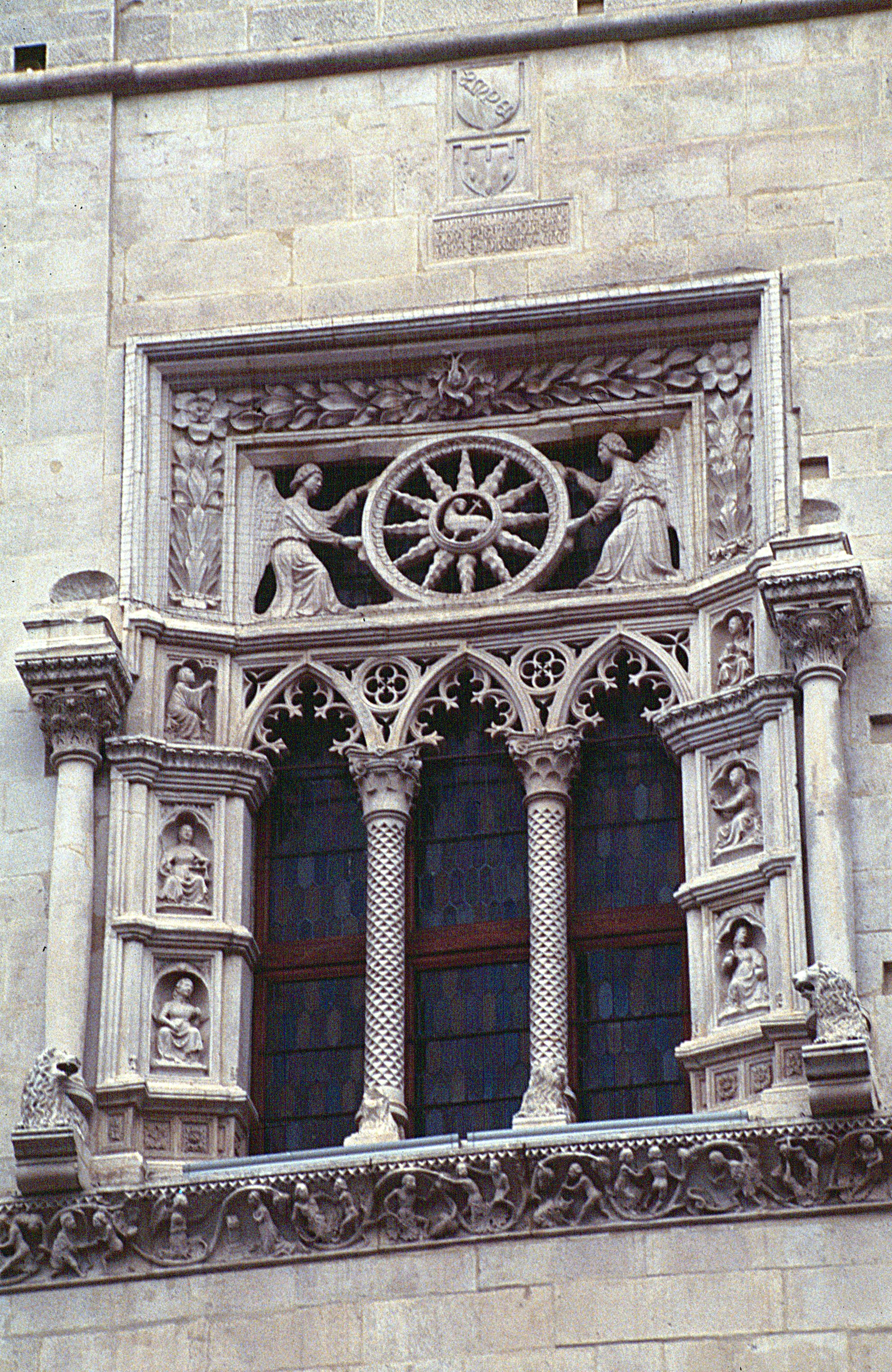 Sulmona: Museo Civico, Detail